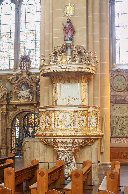 Kanzel des Paderborner Domes